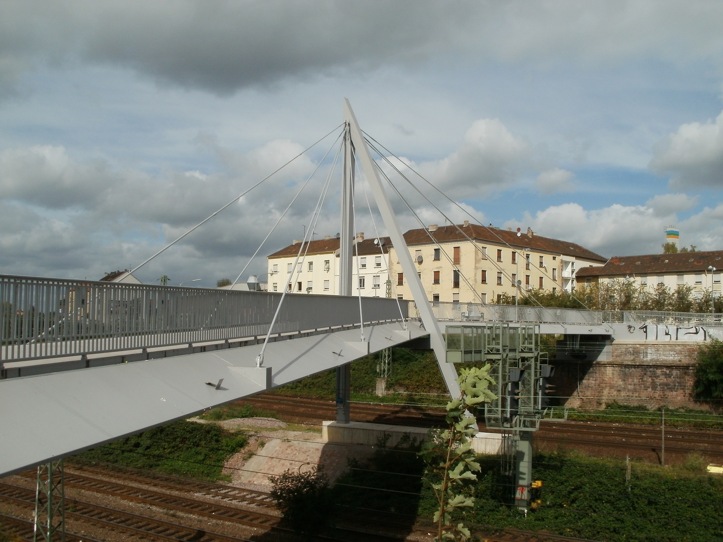 Wilhelm-Meyer-Brücke (Saarbrücken)